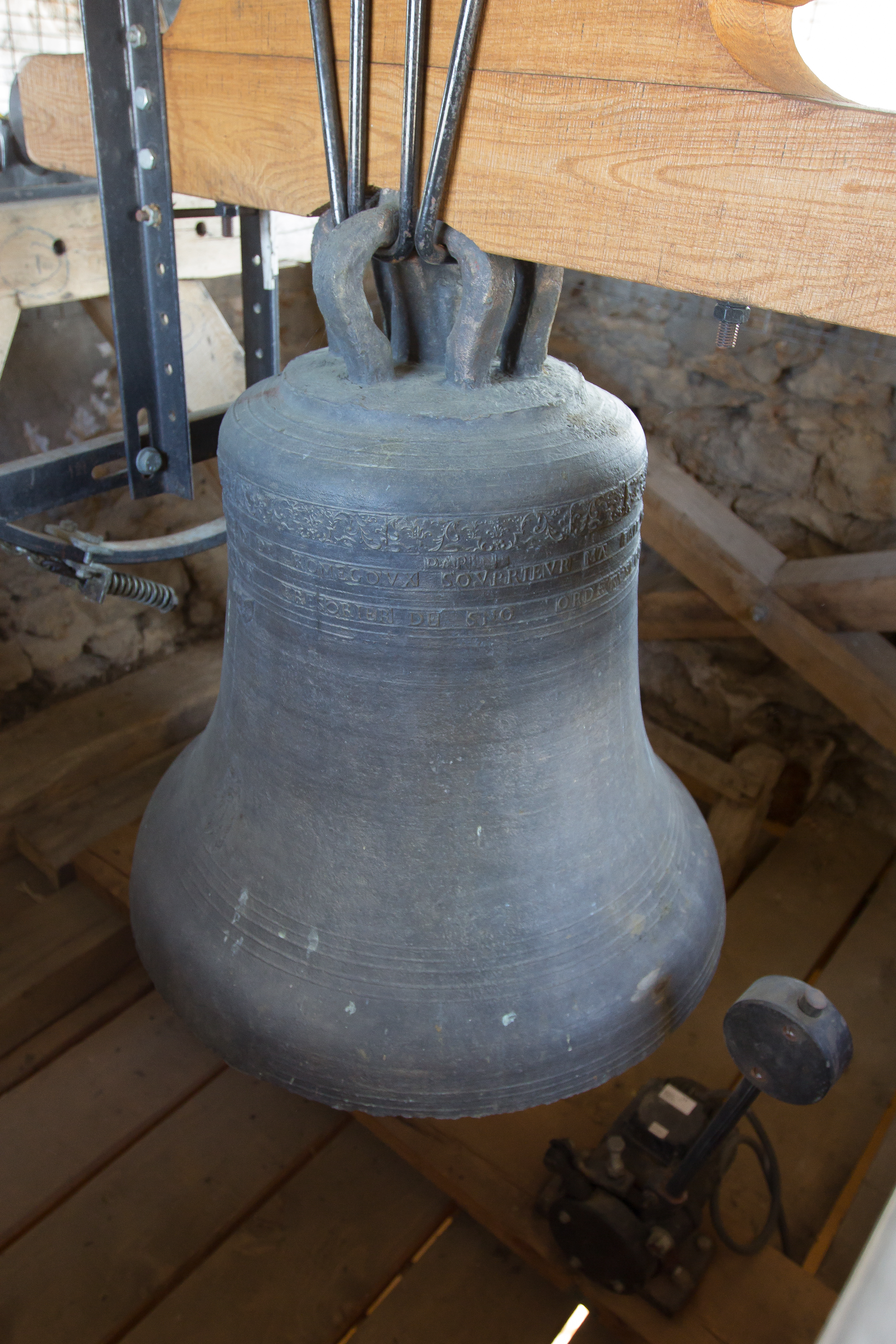 La cloche de l'église Saint-Marcel de Villabé / Villabé / Essonne / France